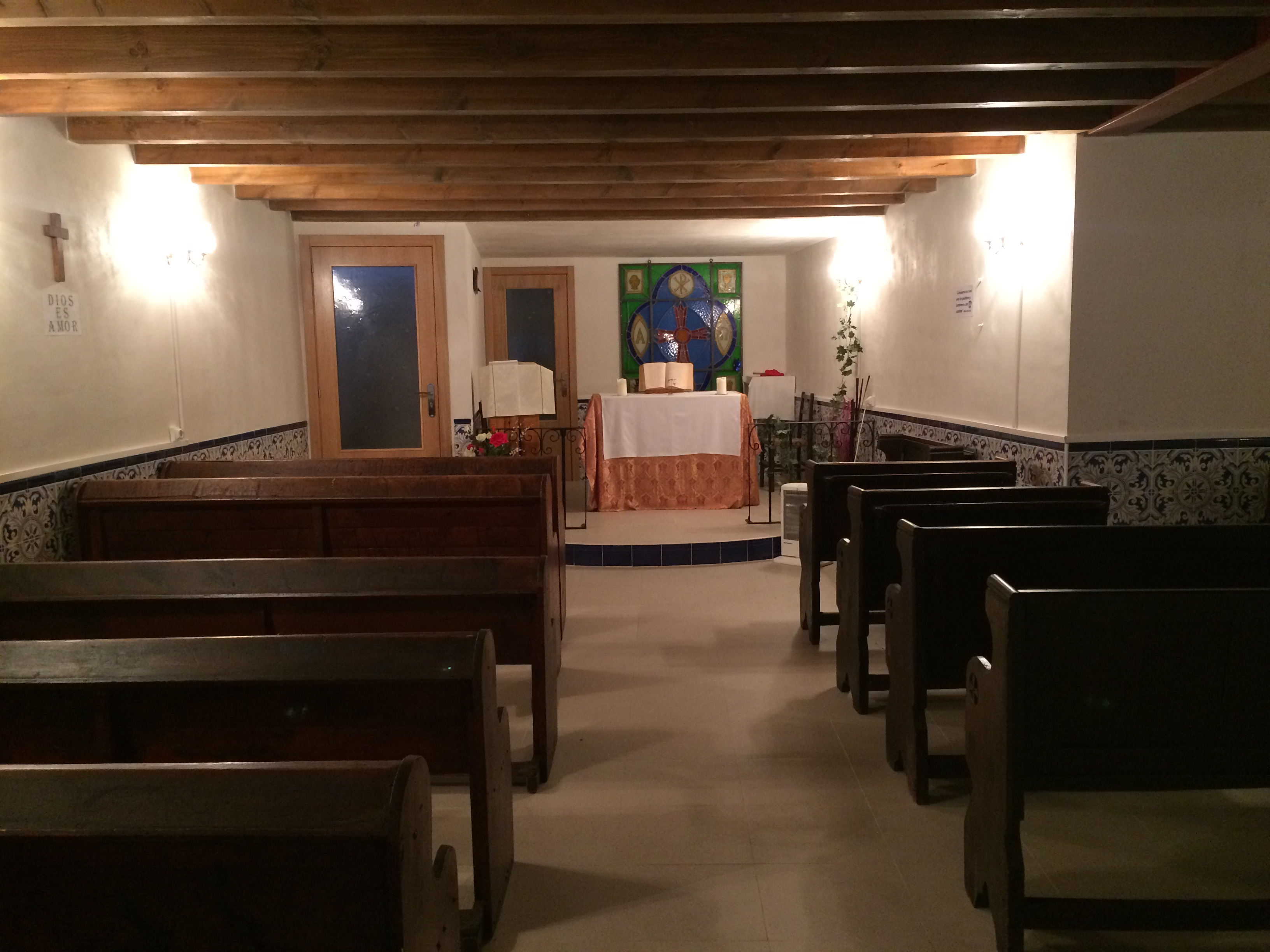 Interior de la Iglesia Anglicana del Santo Espíritu (Villaescusa, Zamora, 2018)